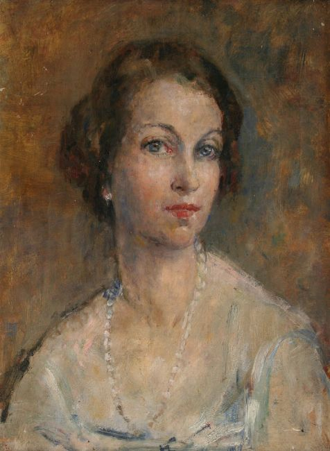 Mrs Ambrose McEvoy